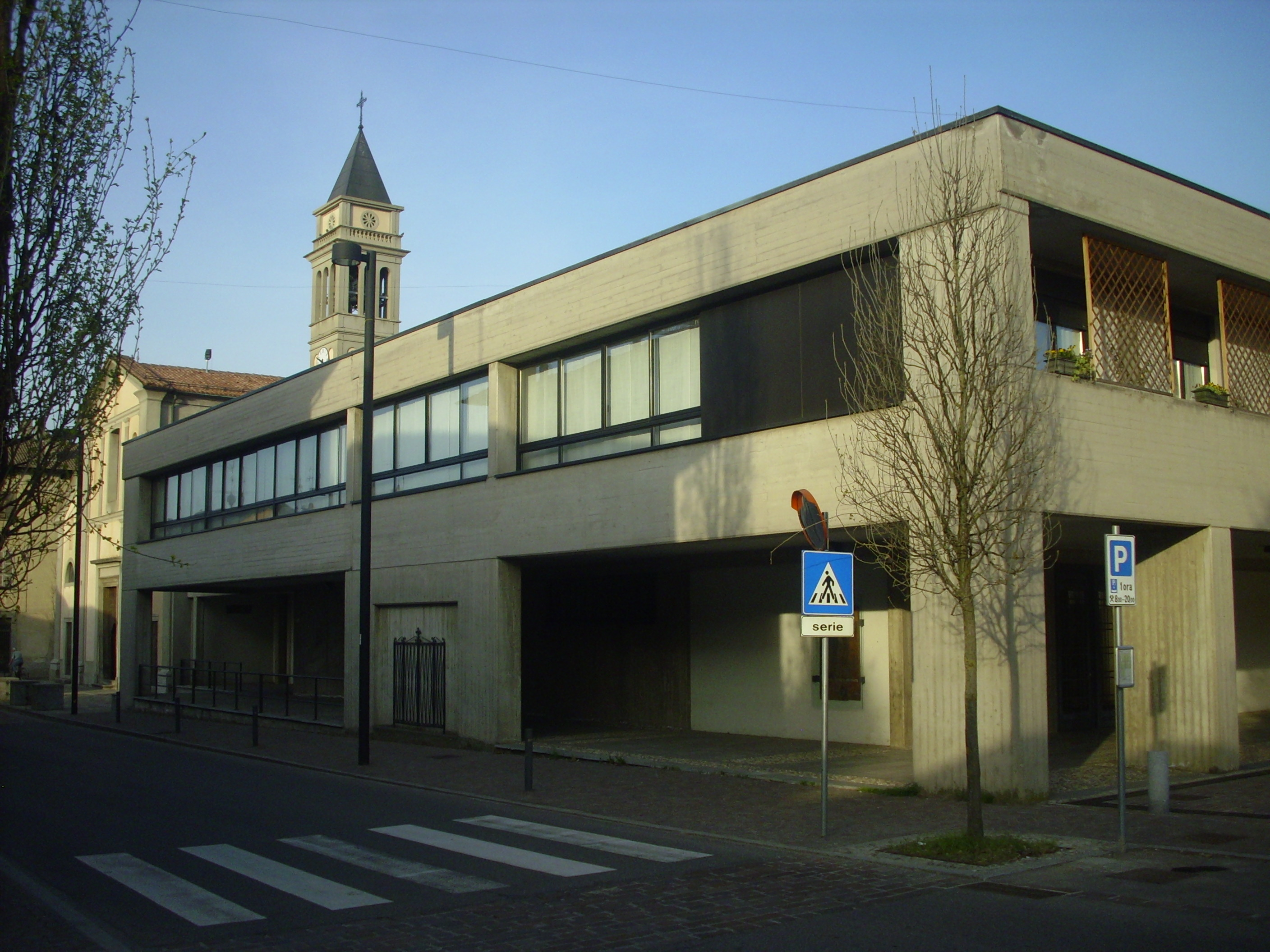 Parrocchia di Montesolaro